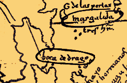 Detall del mapa de Joan de la Cosa, feta per Nito Verdera on assenyala dos toponims clarament catalans: Margalida i Boca de dragó